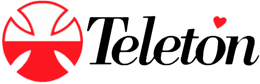 Logotipo de la Teletón Chile, 1996-2004